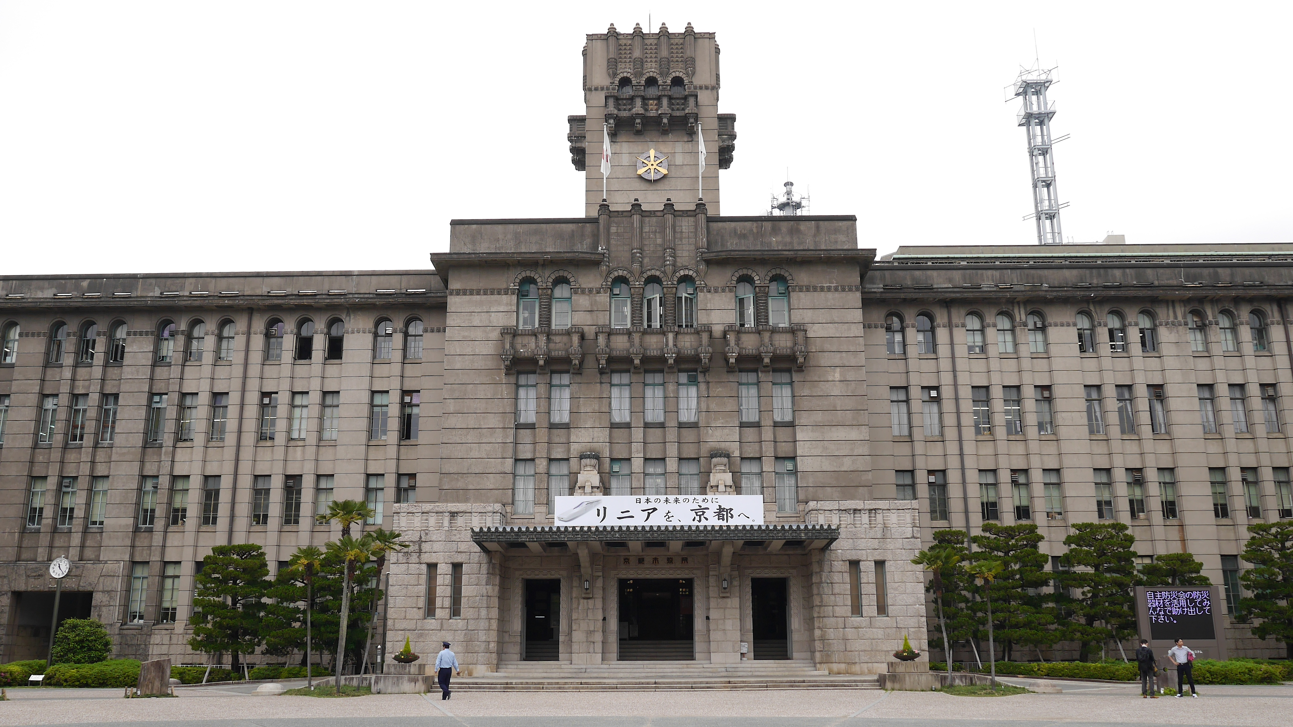 京都市役所本庁舎